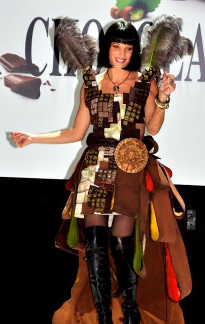 Erika Moulet au défilé de mode du salon du chocolat